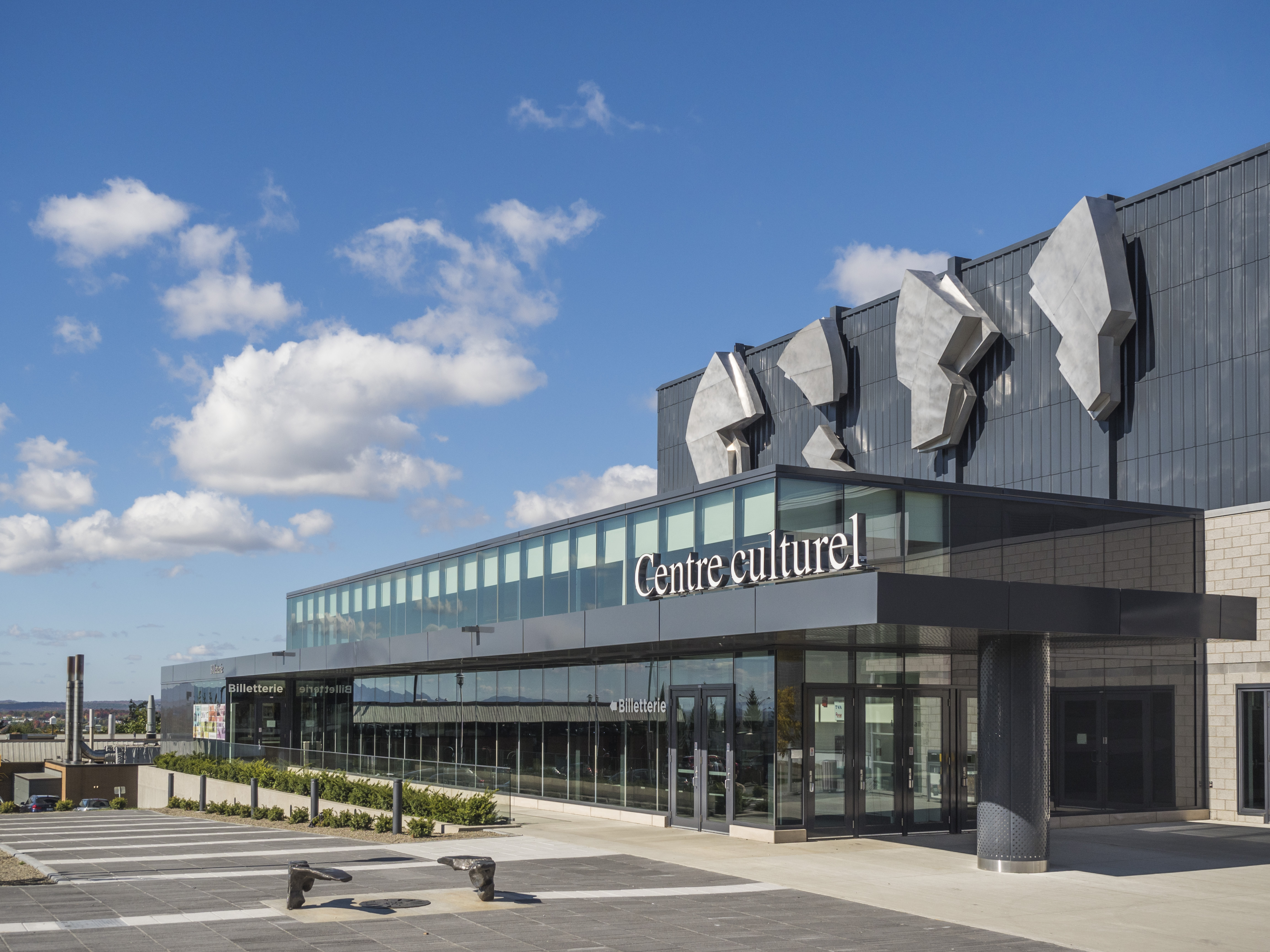 Le Centre culturel de l'Université de Sherbrooke regroupe notamment la salle de spectacle Maurice-O'Bready et la Galerie d'art.